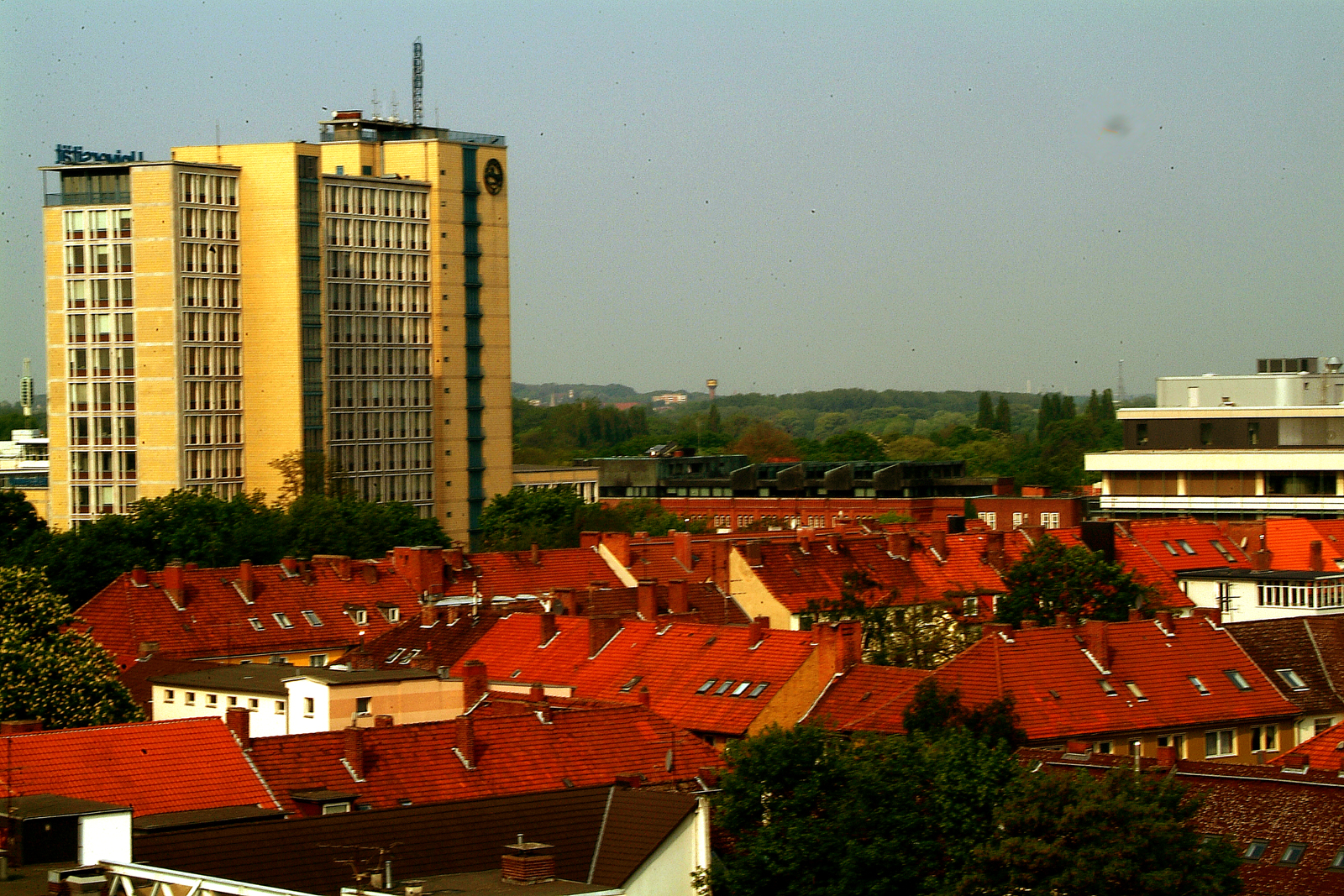 Sie haben aussagekräftigere, bessere, ergänzende Bilder? Sogar ein historisches Dokument? Zeigen Sie' s uns. Stiften Sie es Ihren Kindern, unseren Enkeln, allen Menschen.